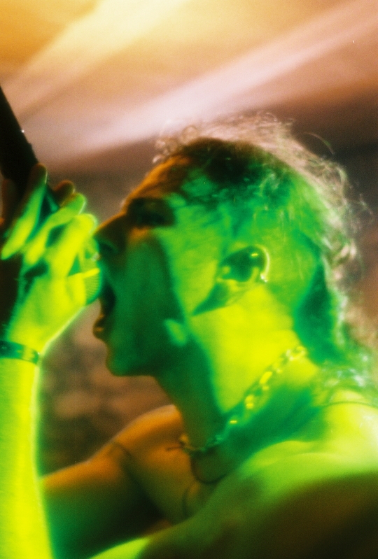 Tamtrum @ Dark Omen II Festival - Château de Vaux-le-Pénil